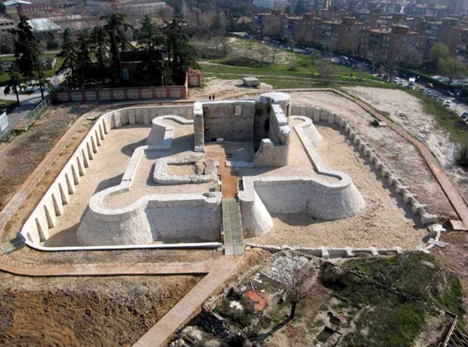 El Castillo de la Alameda o de Barajas es uno de los escasos vestigios de la arquitectura militar del pasado siglo XV y uno de los pocos castillos que ha sobrevivido al paso del tiempo. Bajo él y su entorno, existen restos de asentamientos antiguos desde la Edad de Bronce hasta la época romana. En el yacimiento donde está ubicado el castillo se encuentra también un edificio que se conoce como la casa del guarda, además del cementerio, un nido de ametralladoras de la Guerra Civil y el panteón de los Duques de Fernán Núñez, todos ellos dentro de un parque.